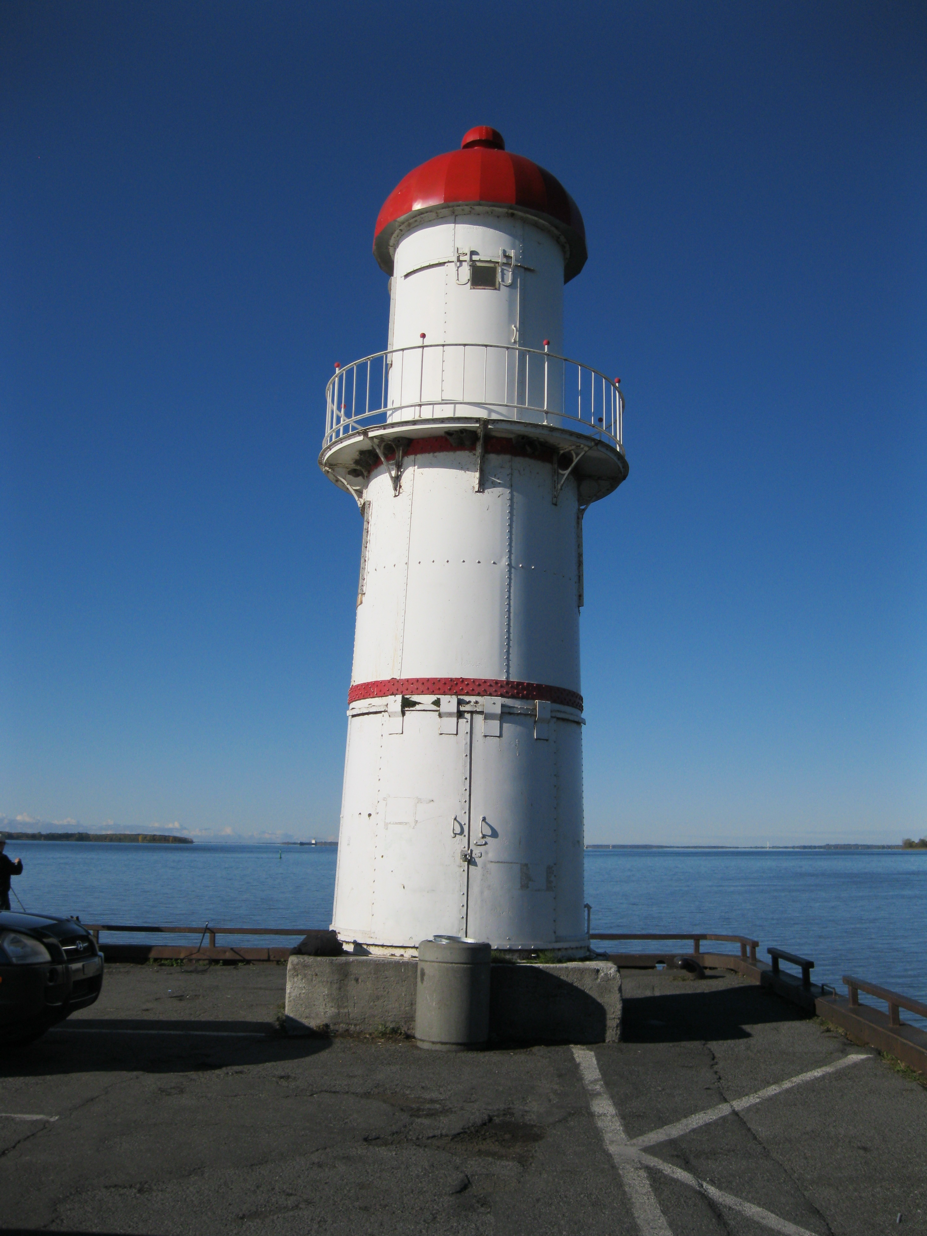 Le phare (avant) est l’un de deux phares jumeaux qui se dressent dans le parc Saint-Louis, secteur de loisirs municipal situé au bord de l’eau, à Lachine, Québec, Canada.